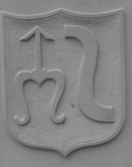 Herb Szydłowca na pomniku JP II